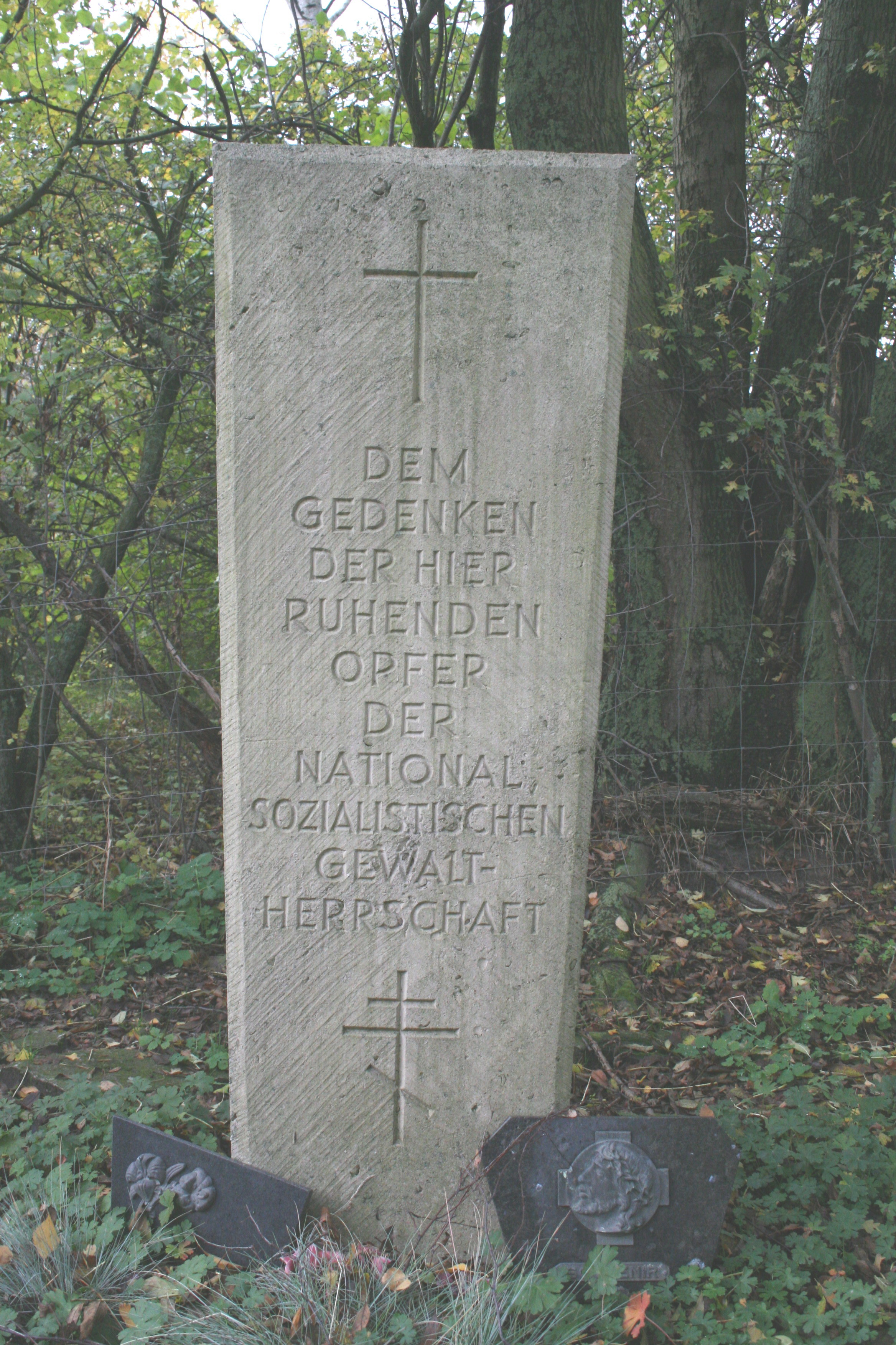 KZ Schandelah: Gedenkstein der Gedenkstätte auf dem Friedhof Scheppa